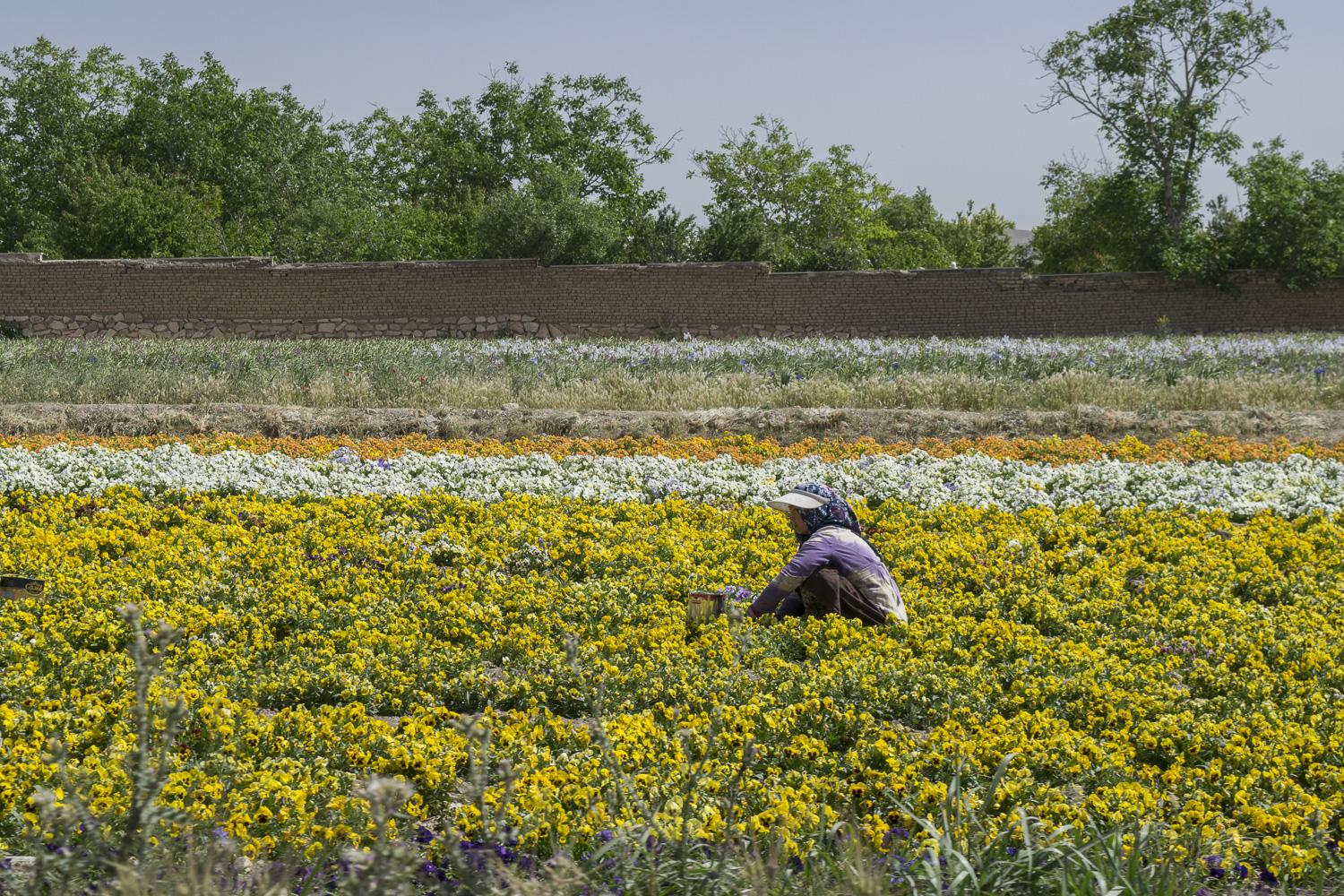 Flowers-Mahallat-Iran